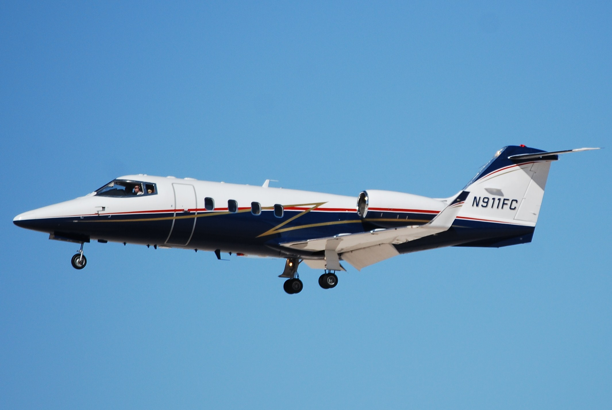 PRIVATE